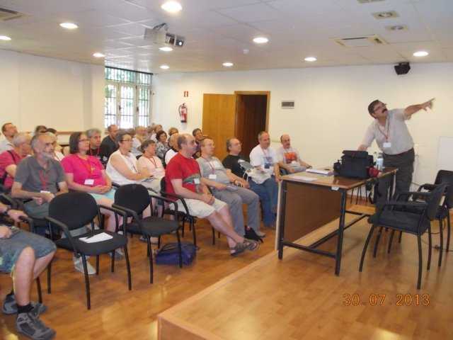 filmoj